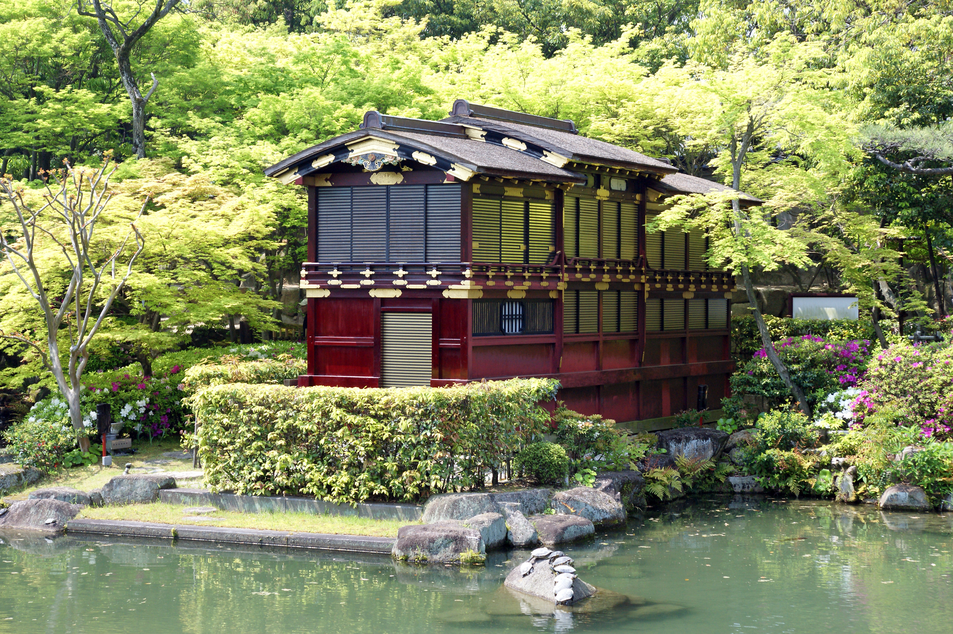 "Funayakata" in Sorakuen, Kobe, Hyogo prefecture, Japan